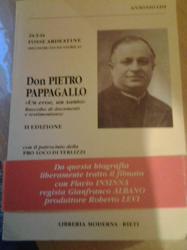 L'opera del Prof. Lisi su Don Pietro Pappagallo nella sua ultima versione